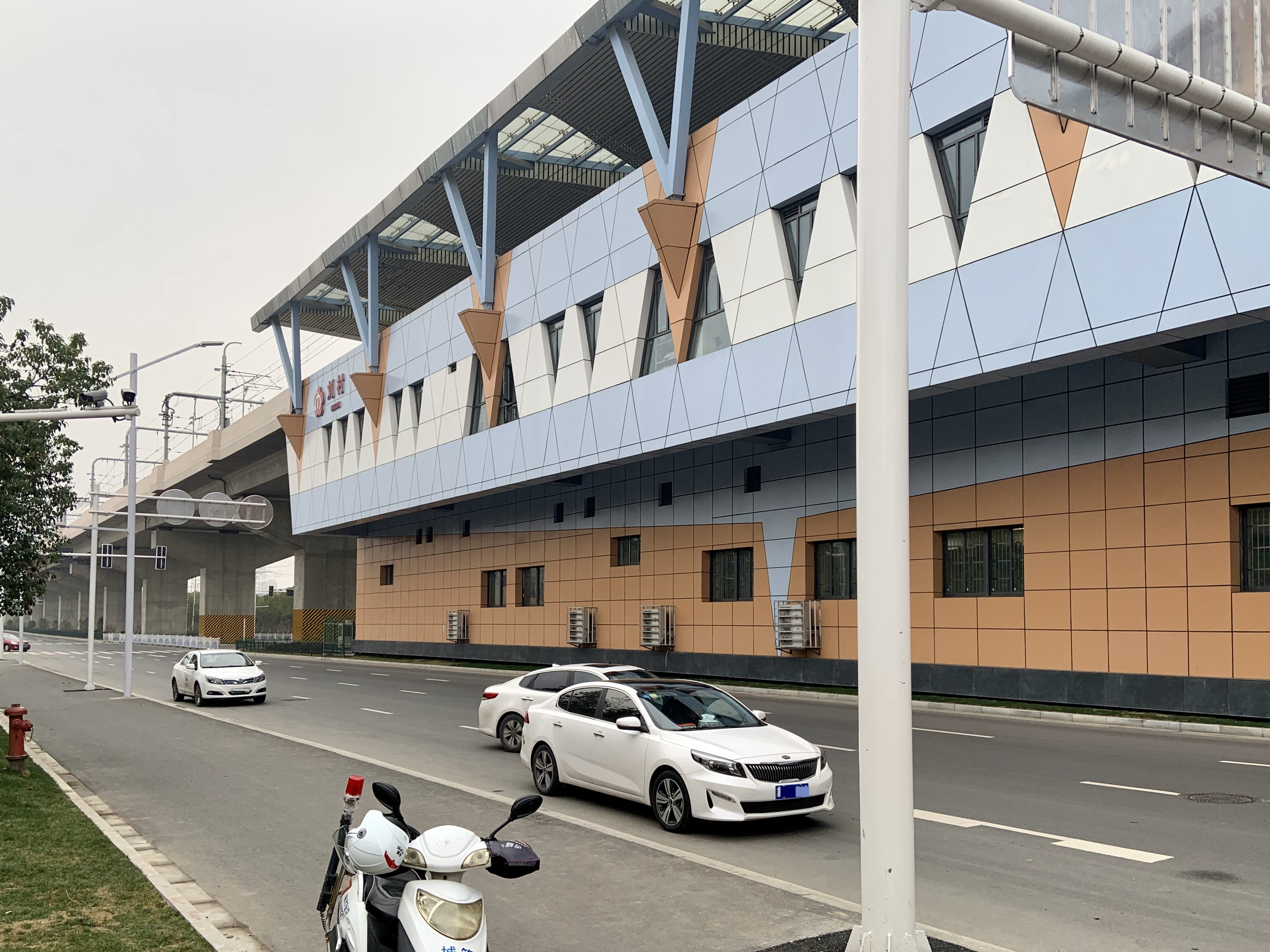 南京地铁S3号线（宁和城际）刘村站外观